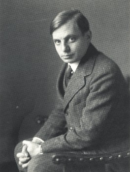 Porträt des Chefredakteurs der „Frankfurter Zeitung“, Heinrich Simon.